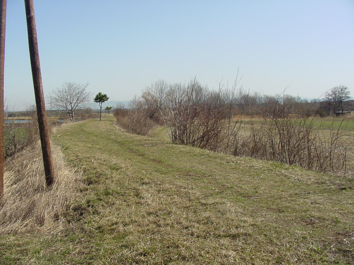 Trasse der ehemaligen Landesbahn Willendorf - Neunkirchen (Bild 1)